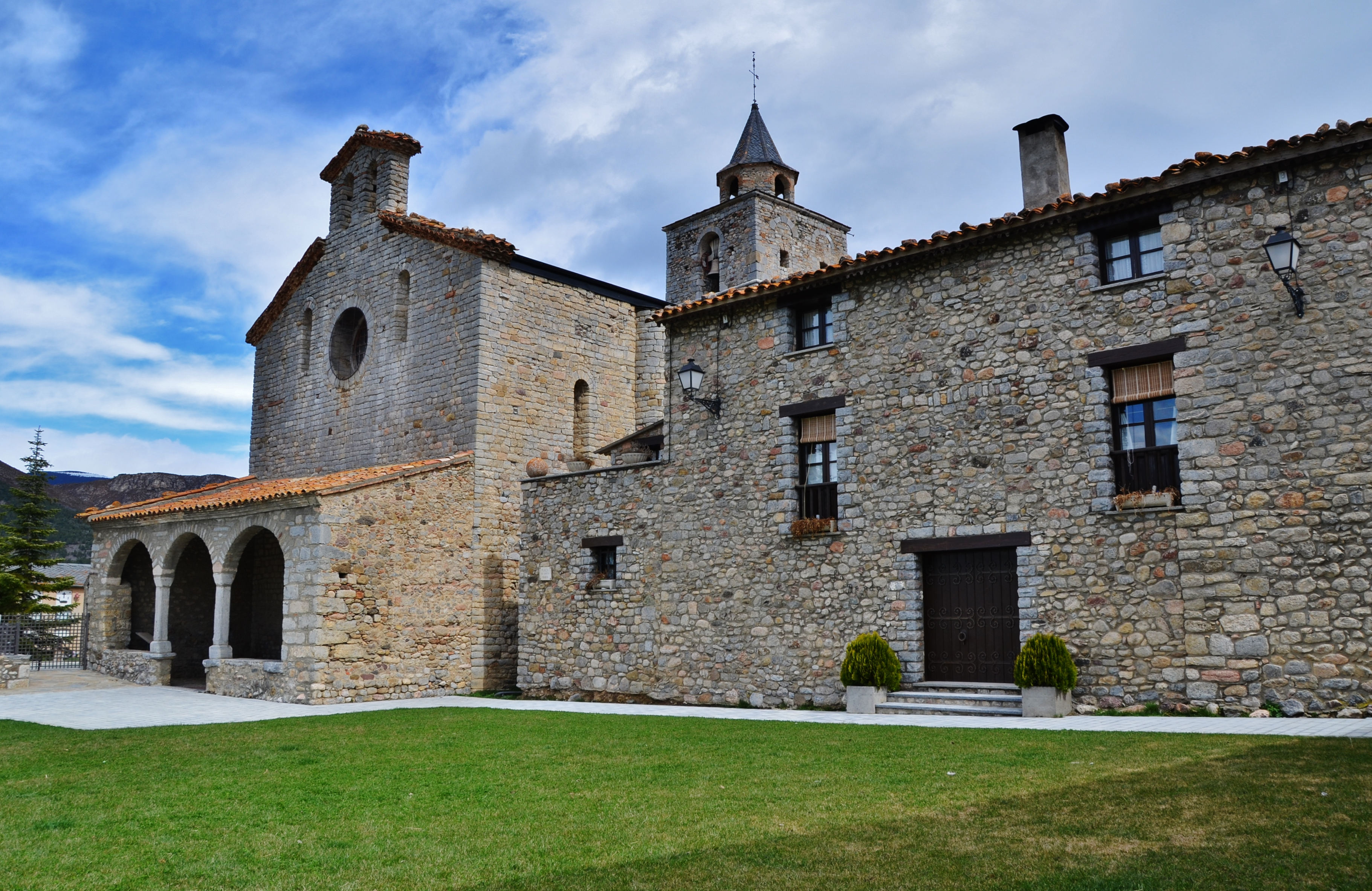 Església de Santa Maria de Talló (Bellver de Cerdanya)